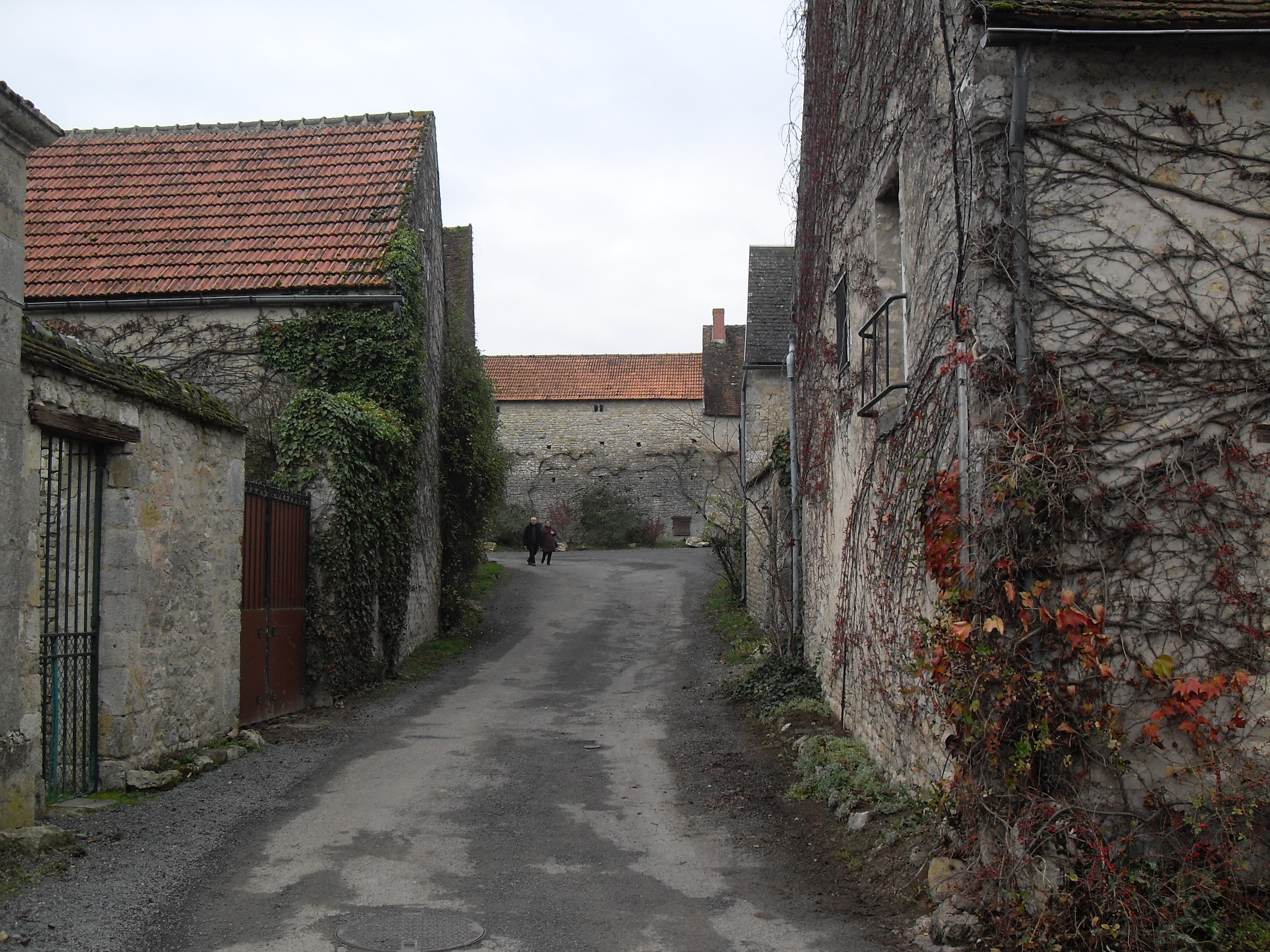 Yèvre-le-Châtel in France